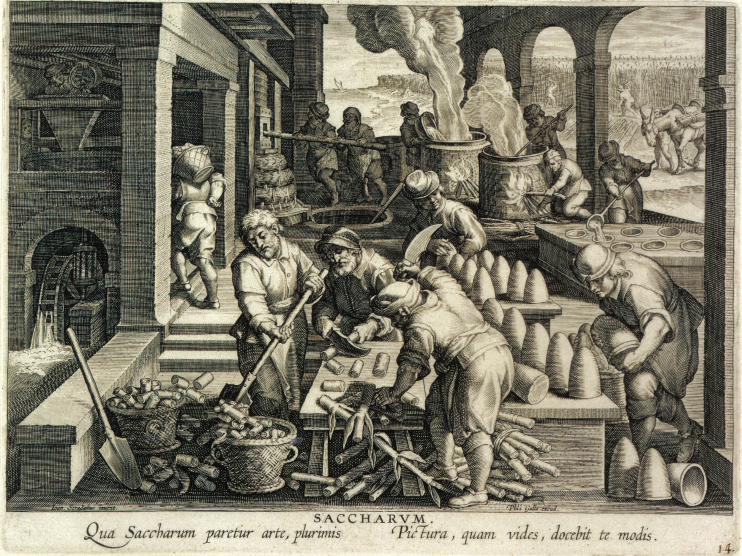 Zuckermühle und die Produktion von Zuckerhüten in Übersee.